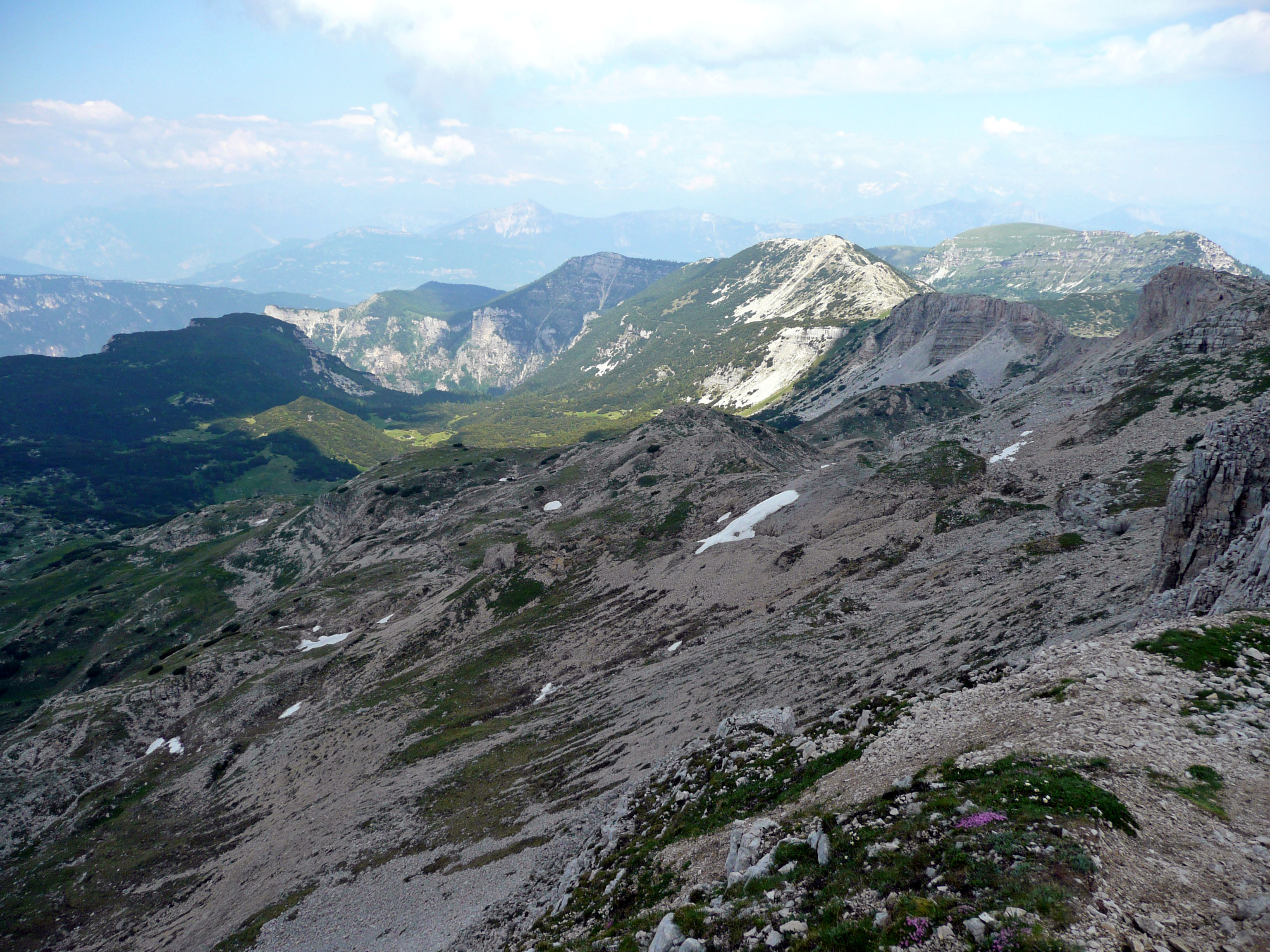 Blick vom Cima Palon